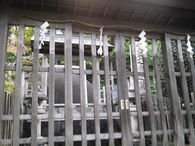 井出クニお墓